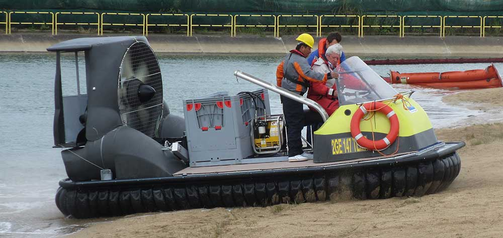 Versione basata sulla piattaforma diesel professionale MACP per la risposta nelle emergenze degli sversamenti di idrocarburi in ambito marino e fluviale.